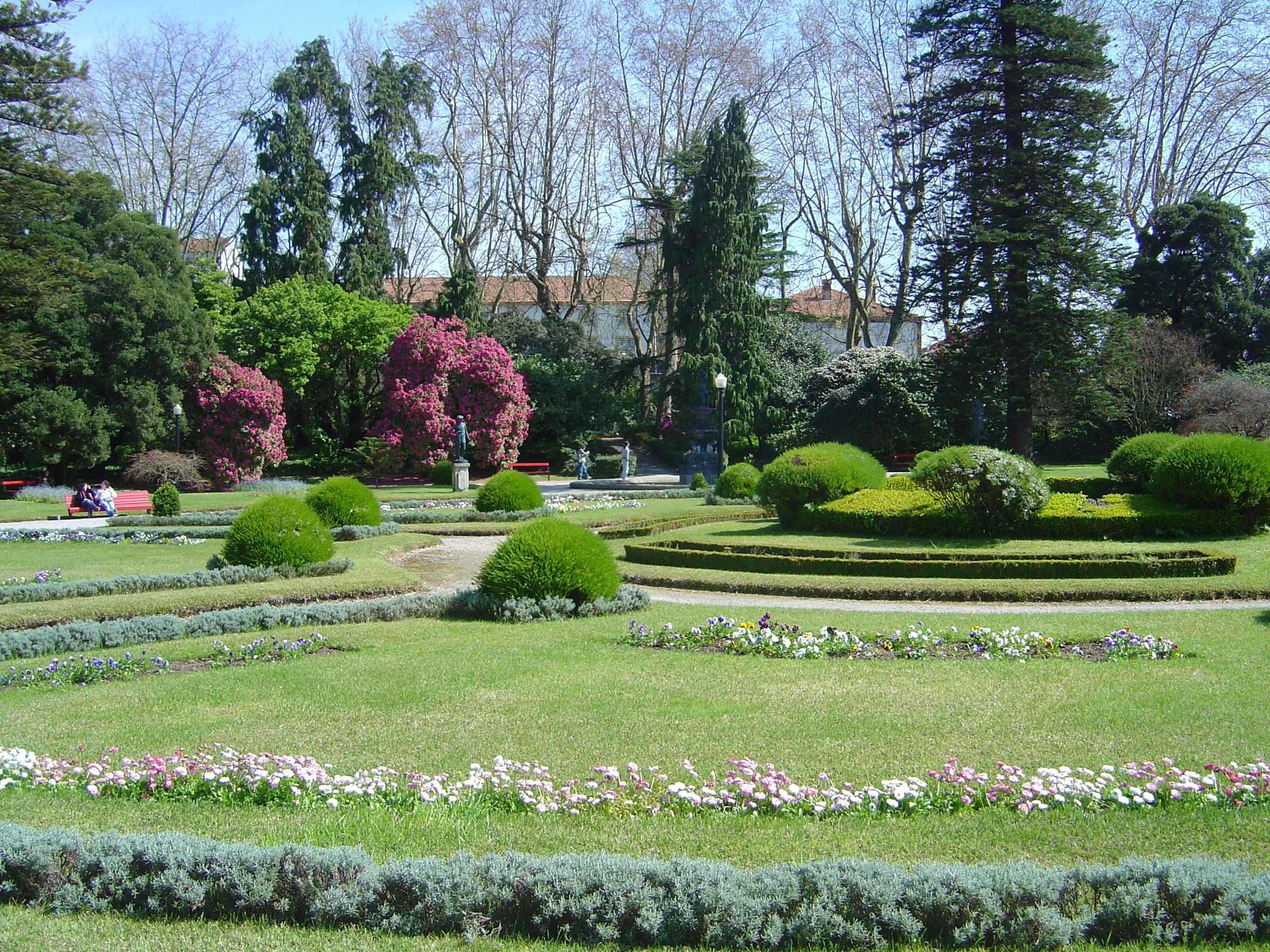 Jardins do Palacio de Cristal